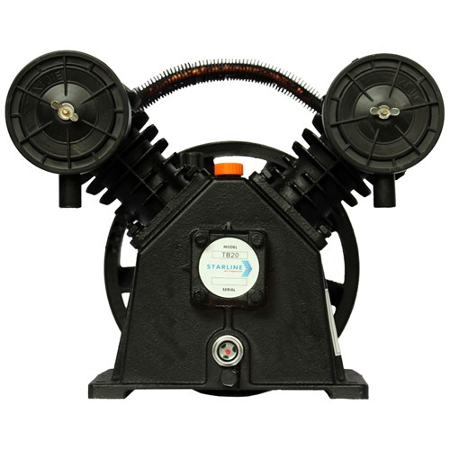 Parte el compresor conocida como "cabezal". Es la parte donde se realiza todo el trabajo de presurizar el aire, con dos entradas y una salida.